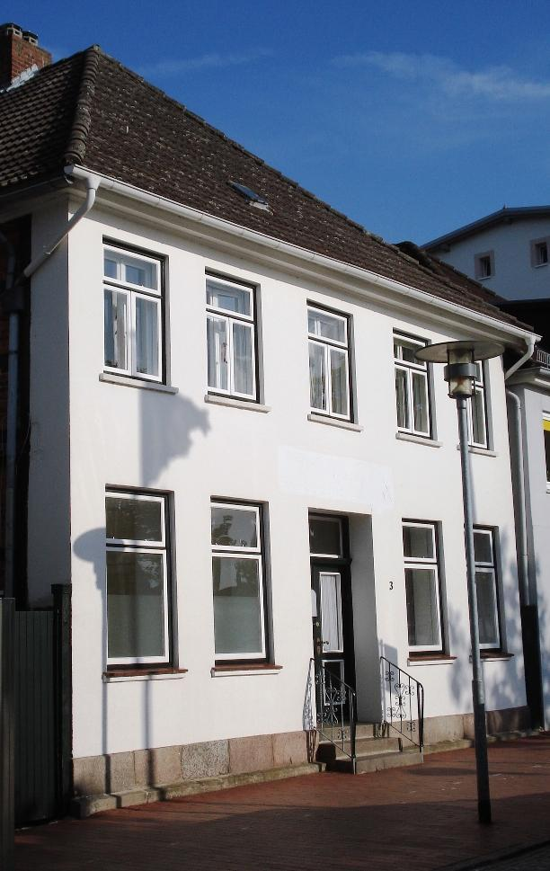 Wohnhaus C.F. Trahns in Neustadt in Holstein